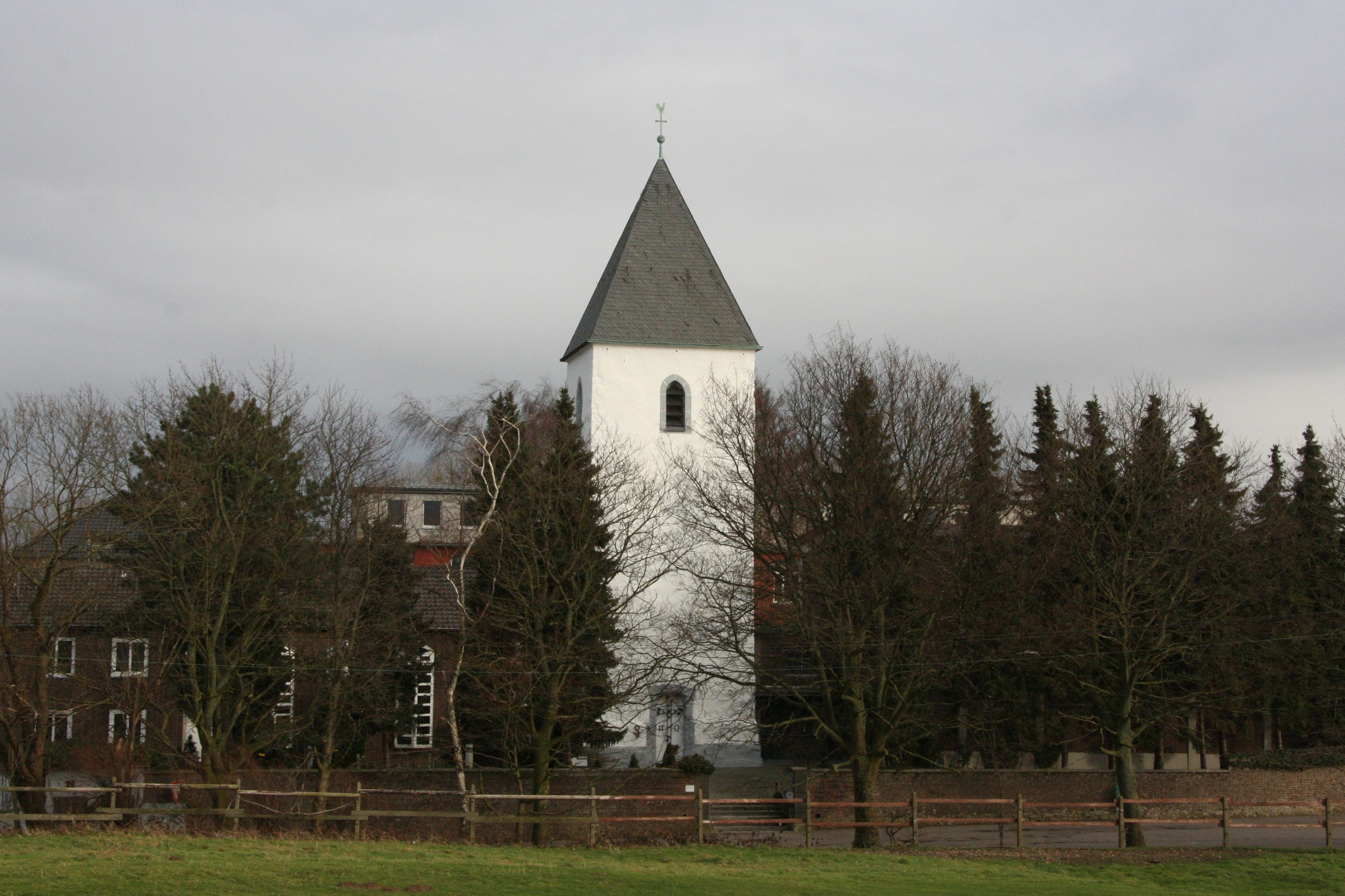 Westturm der ehem. Kath. Pfarrkirche Broich (Heilig Geist Kirche)